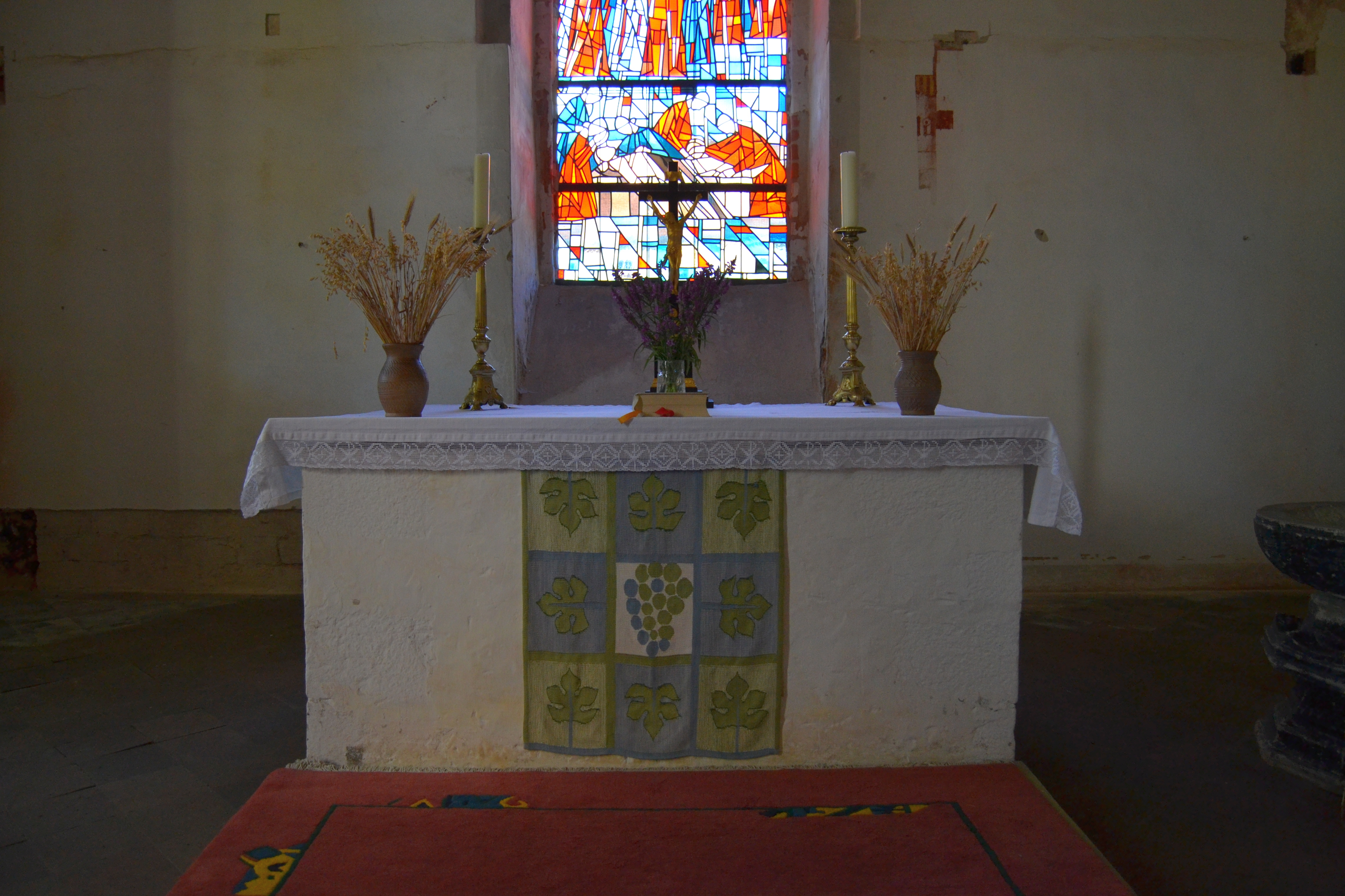 Stadtpfarrkirche St. Marien in Altlandsberg. Die evangelische Stadtpfarrkirche stammt aus der Mitte des 13. Jahrhunderts. Im Jahre 1725 wurde die Sakristei und die Bibliothek angebaut. Die Kanzel stammt aus der Zeit um 1600.